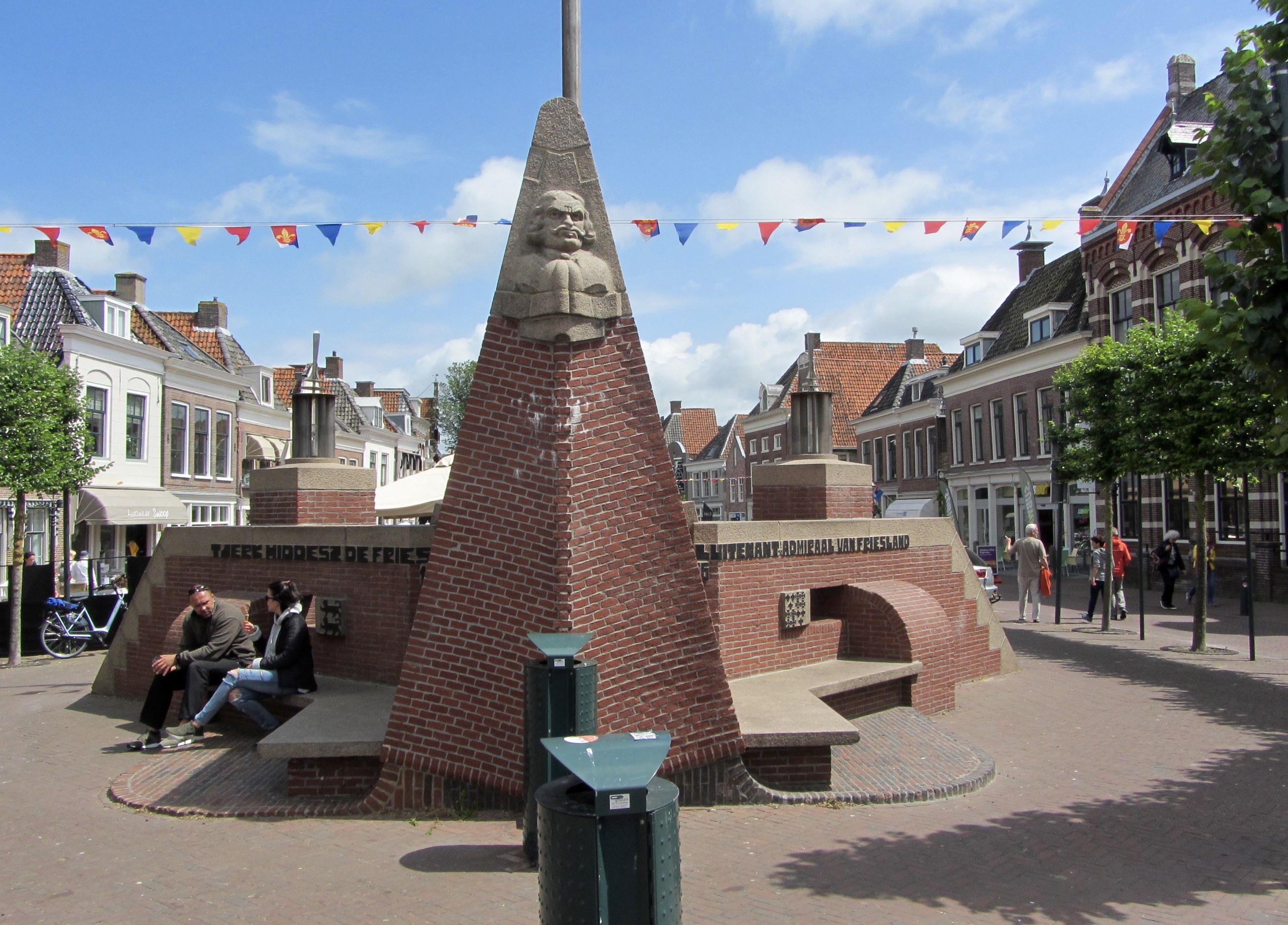 Willem Valk en B.T.Boeyinga, 1934